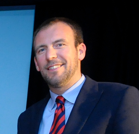 Melchior Wathelet, als staatssecretaris voor Mobiliteit op Brussels Airport in januari 2014